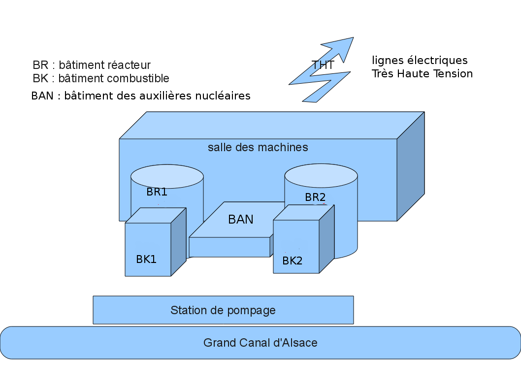 Représentation schématique des installations de la centrale nucléaire de Fessenheim